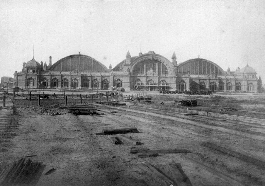 Der Frankfurter Hauptbahnhof 1888